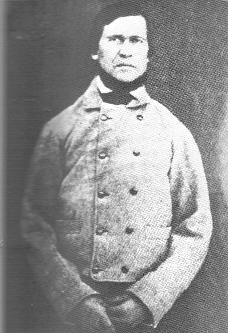 Elias Dahlgreen